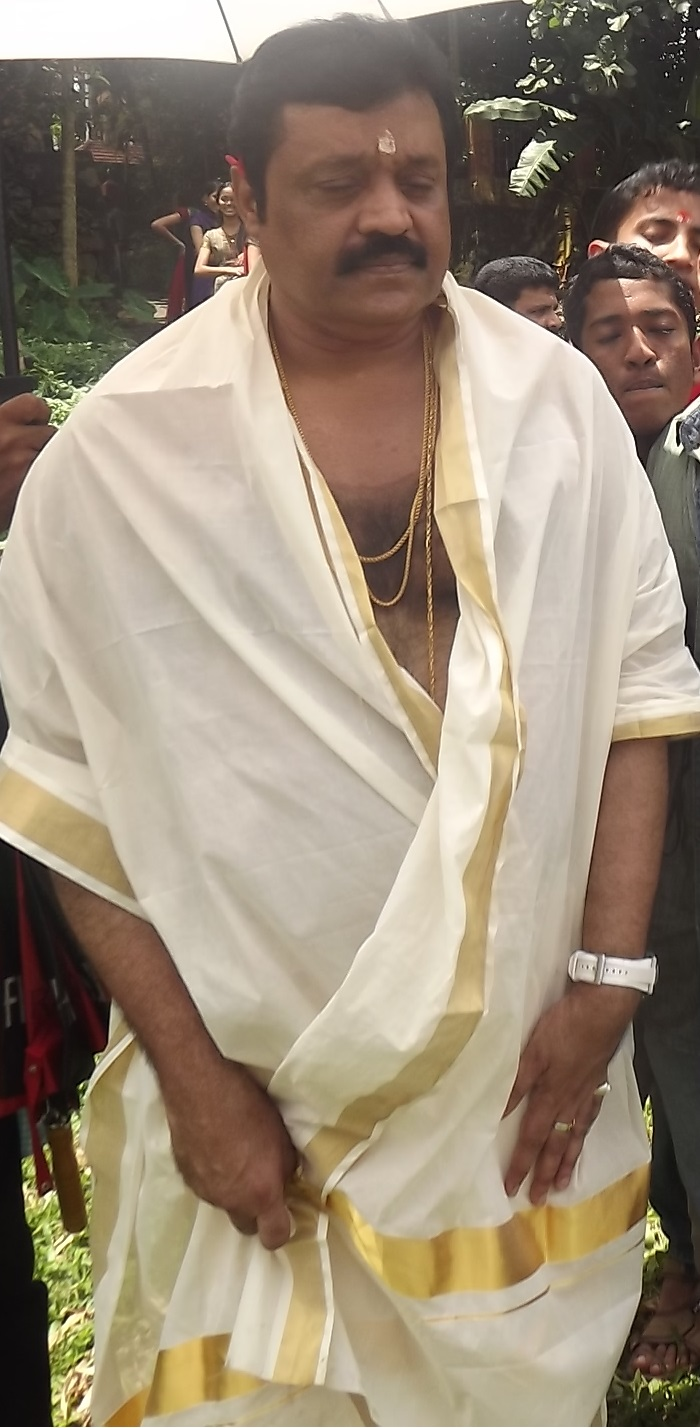 വള്ളസദ്യയിൽ പങ്കെടുക്കാൻ ആറന്മുളയിലെത്തിയ സുരേഷ് ഗോപി